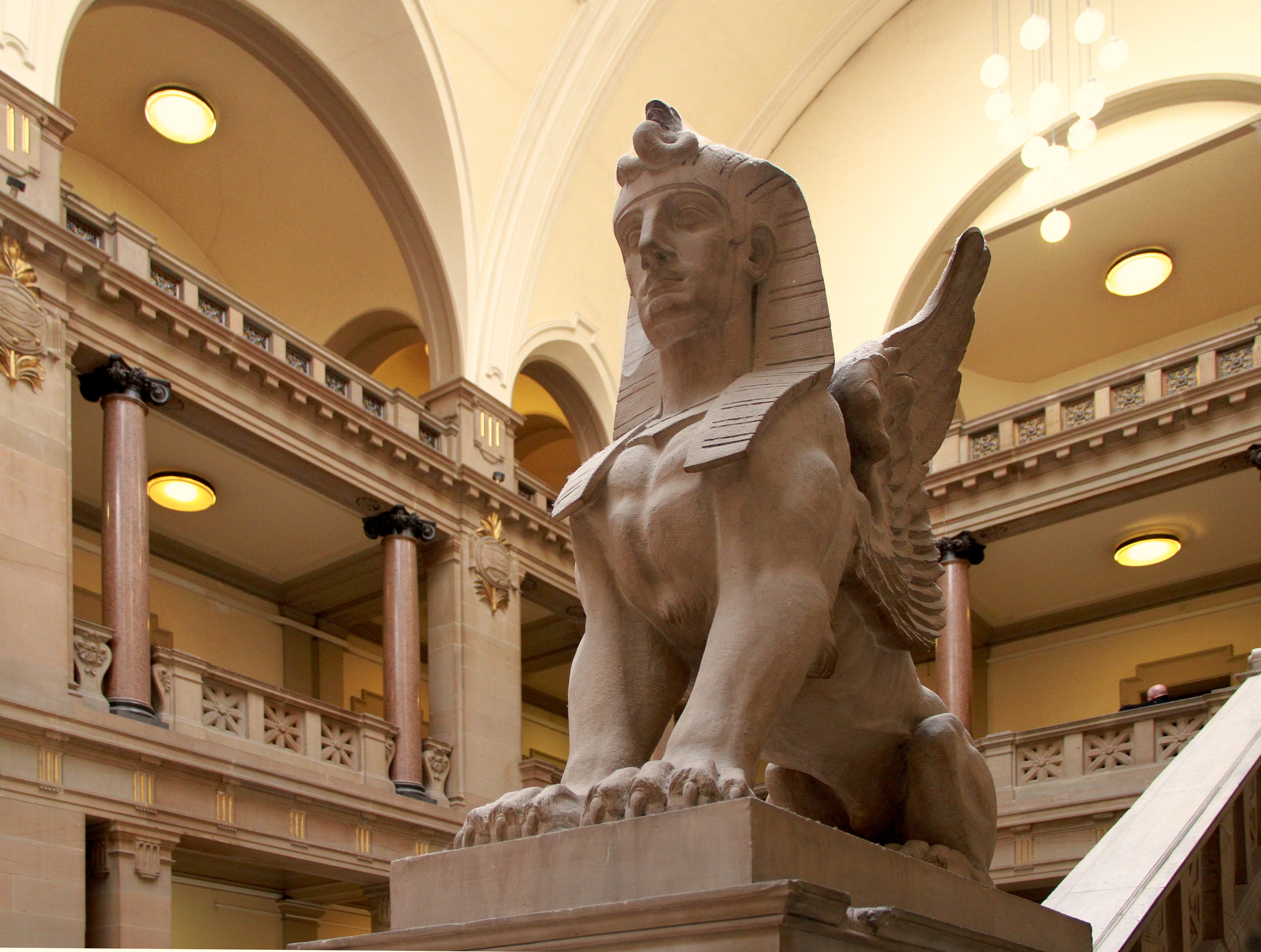 Strasbourg, palais de Justice le grand escalier dans la salle des pas perdus.